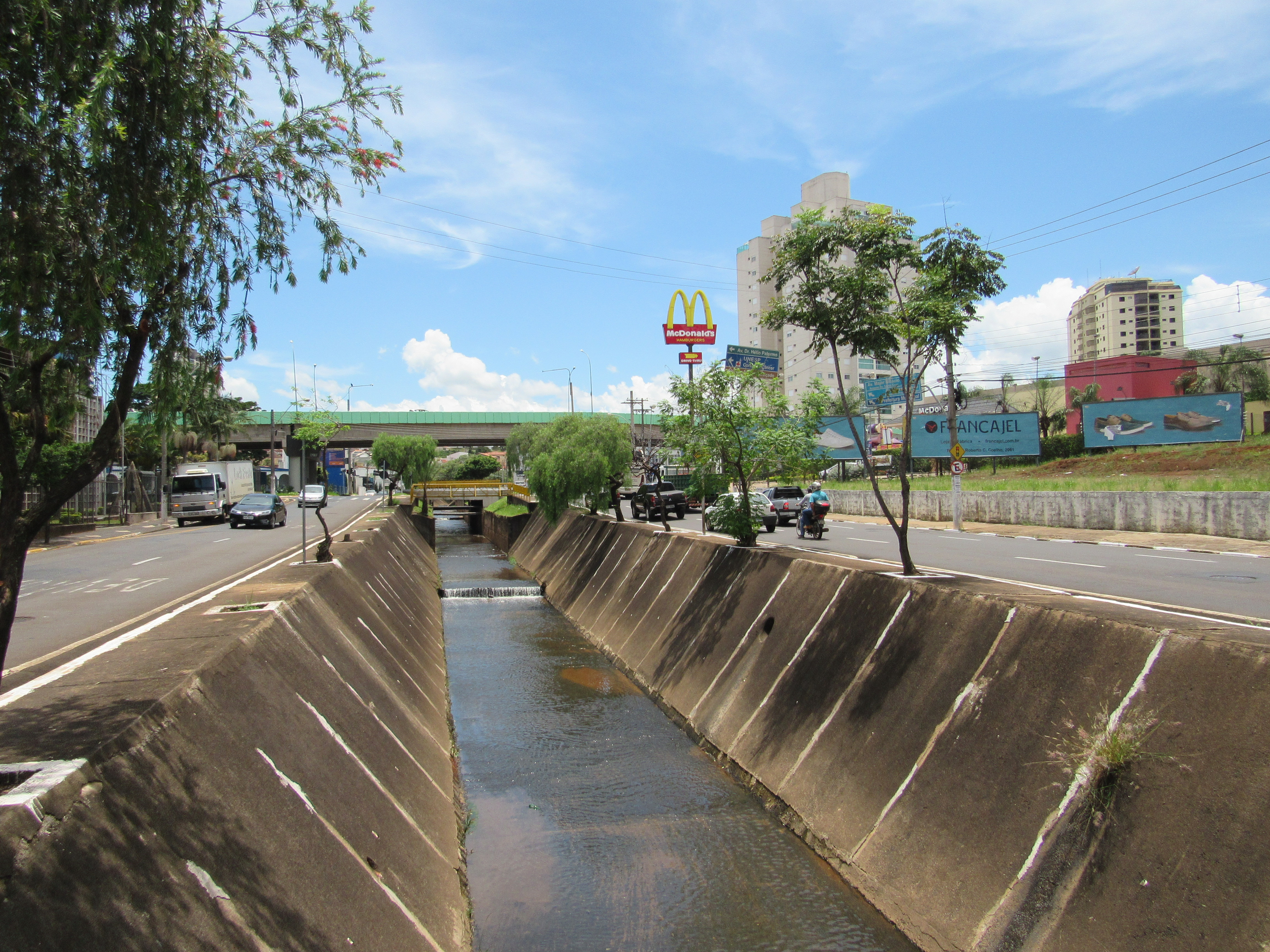 Avenida Dr. Ismael Alonso Y Alonso/Corrego Cubatão/Viaduto Dona Quita (Avenida Major Nicácio) ao fundo, Franca (SP), Brasil (13 de janeiro de 2019)